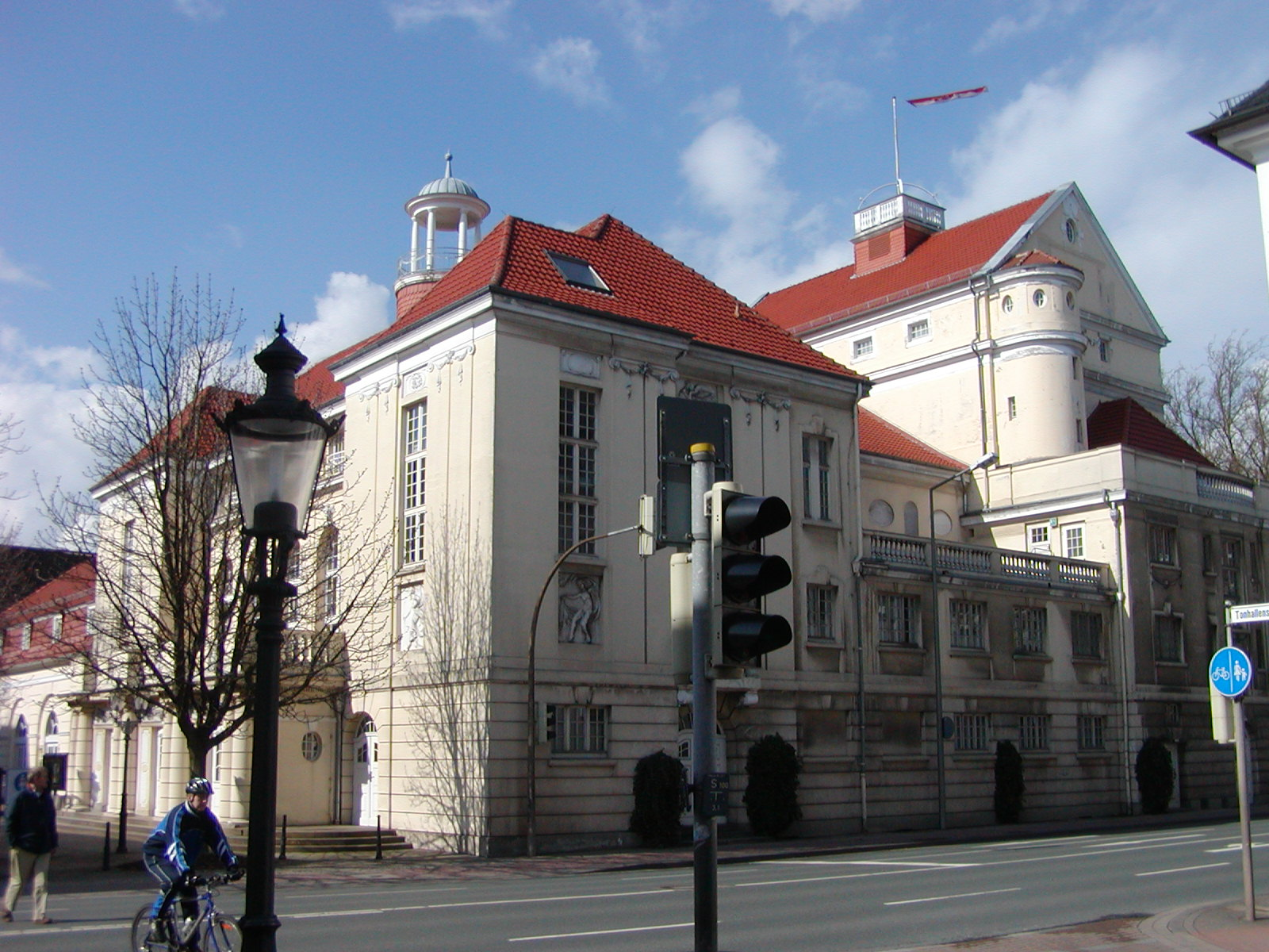 Das Stadttheater Minden in Minden, Nordrhein-Westfalen. Das Theater wurde in den Jahren 1906 bis 1908 in spätbarocker Form erbaut, der Entwurf stammt von den Architekten August Kersten und Paul Kanold.